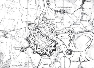 Plan Twierdzy Kozielskiej z 1851r.